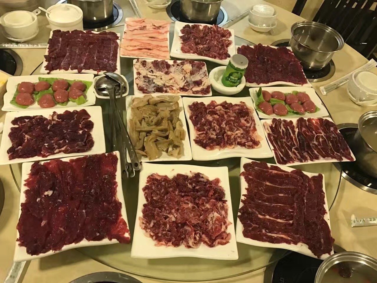 潮汕牛肉火锅